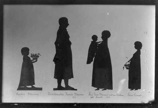 Medlemmer av slekten Hansson (slekt fra Trondheim)